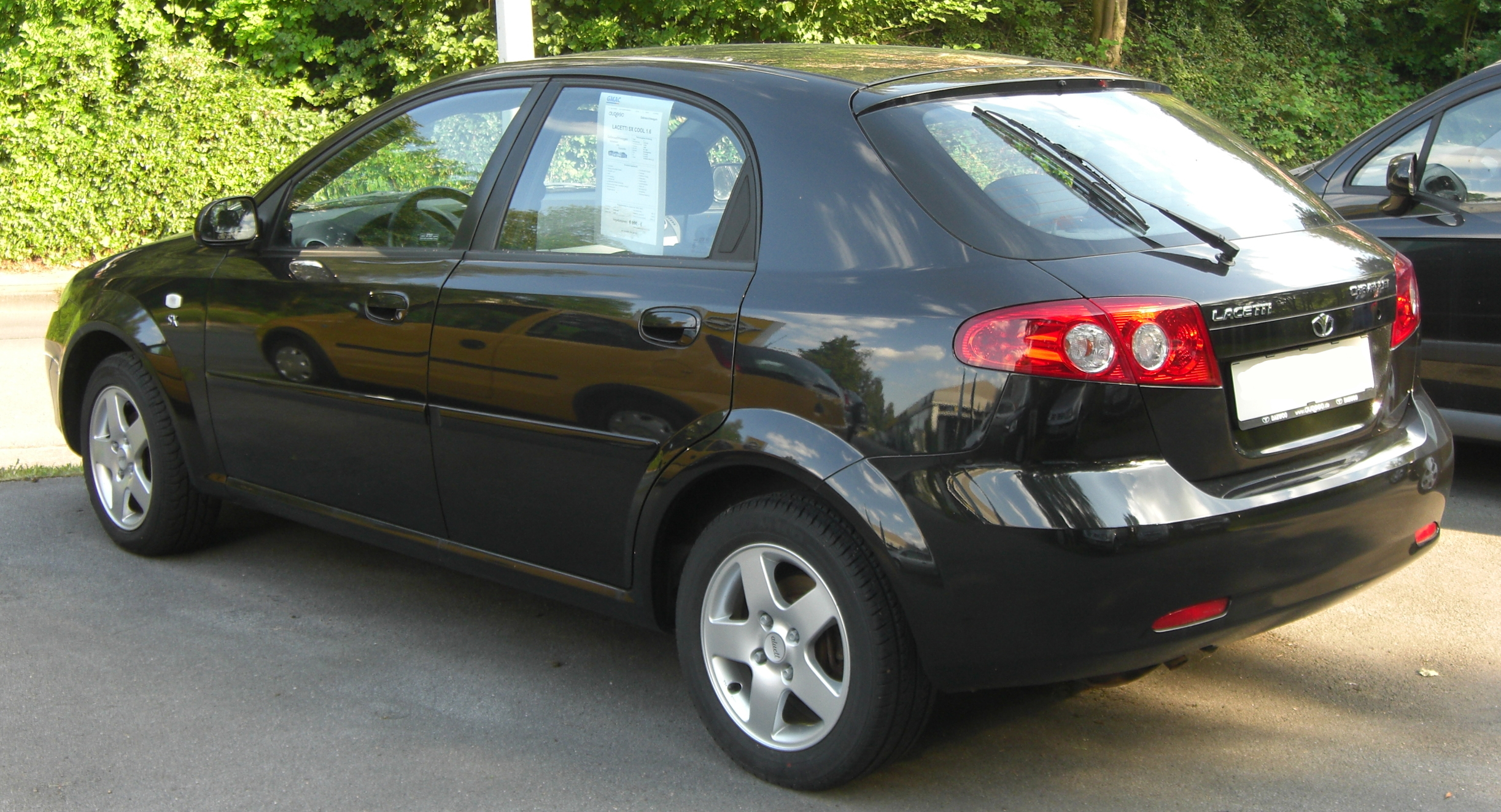 Daewoo Lacetti